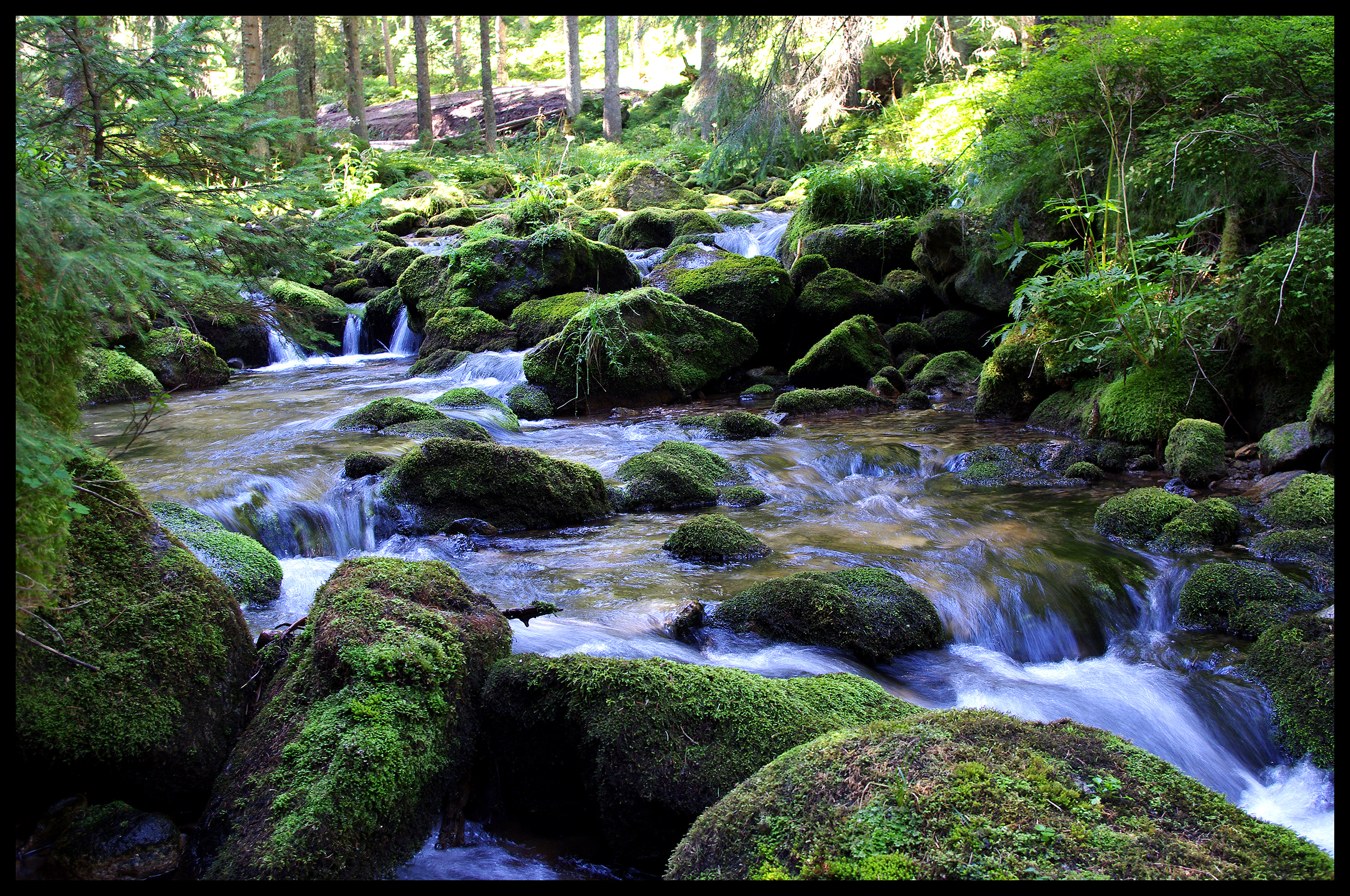 Starorobociański Potok